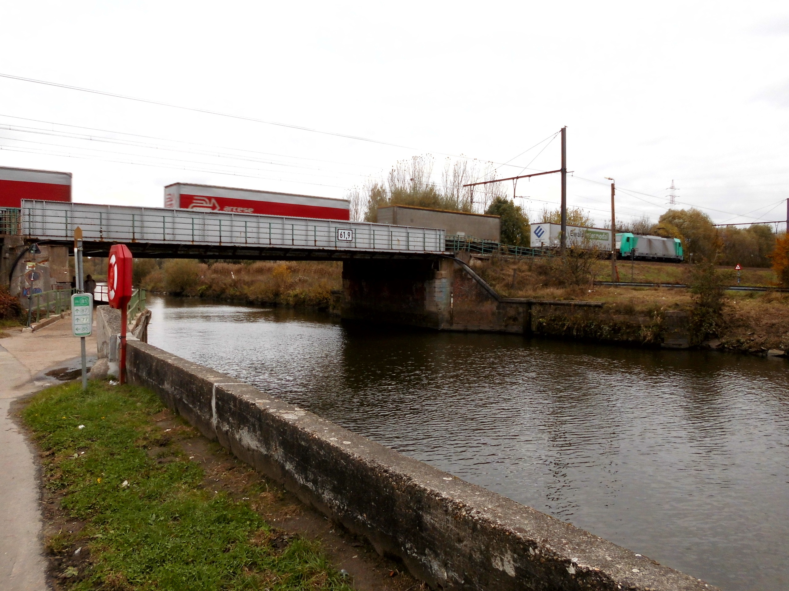 Spoorwegbrug over de Dender nabij Oudegem - Dendermonde - Oost-Vlaanderen - België